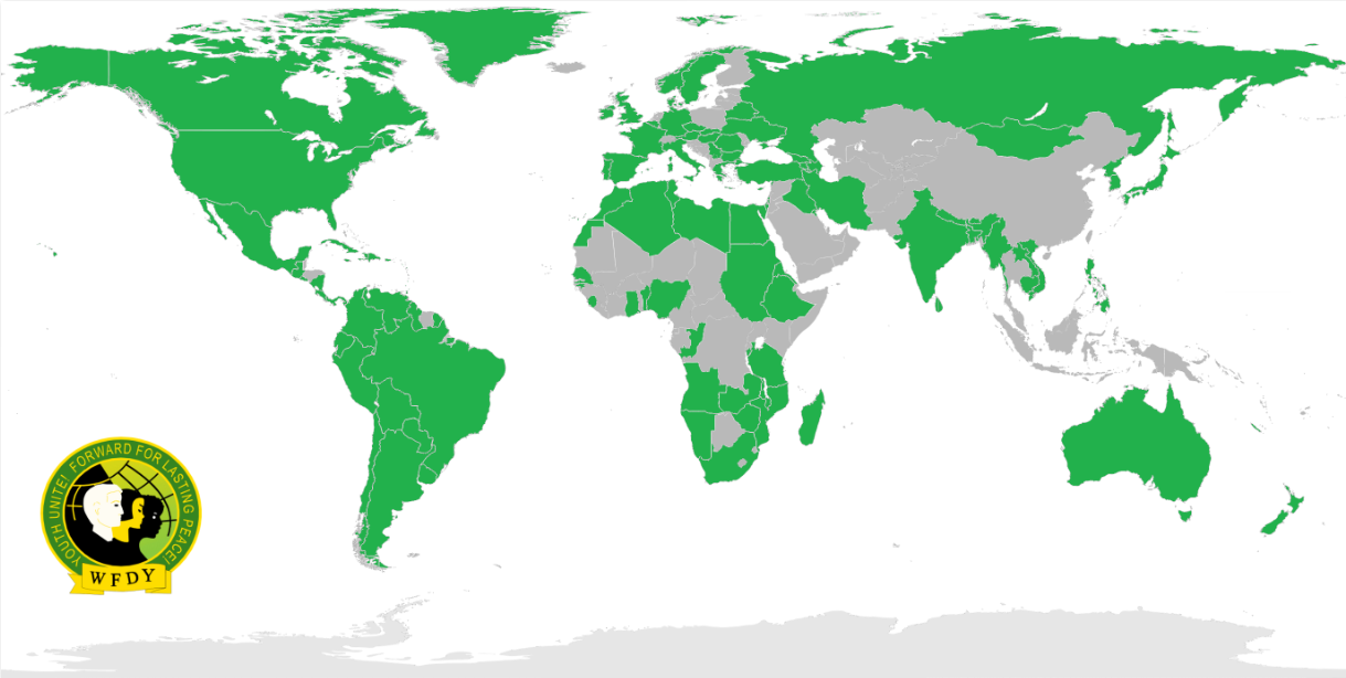 Carte des Etat comprenant au moins une organisation membre de la FMJD